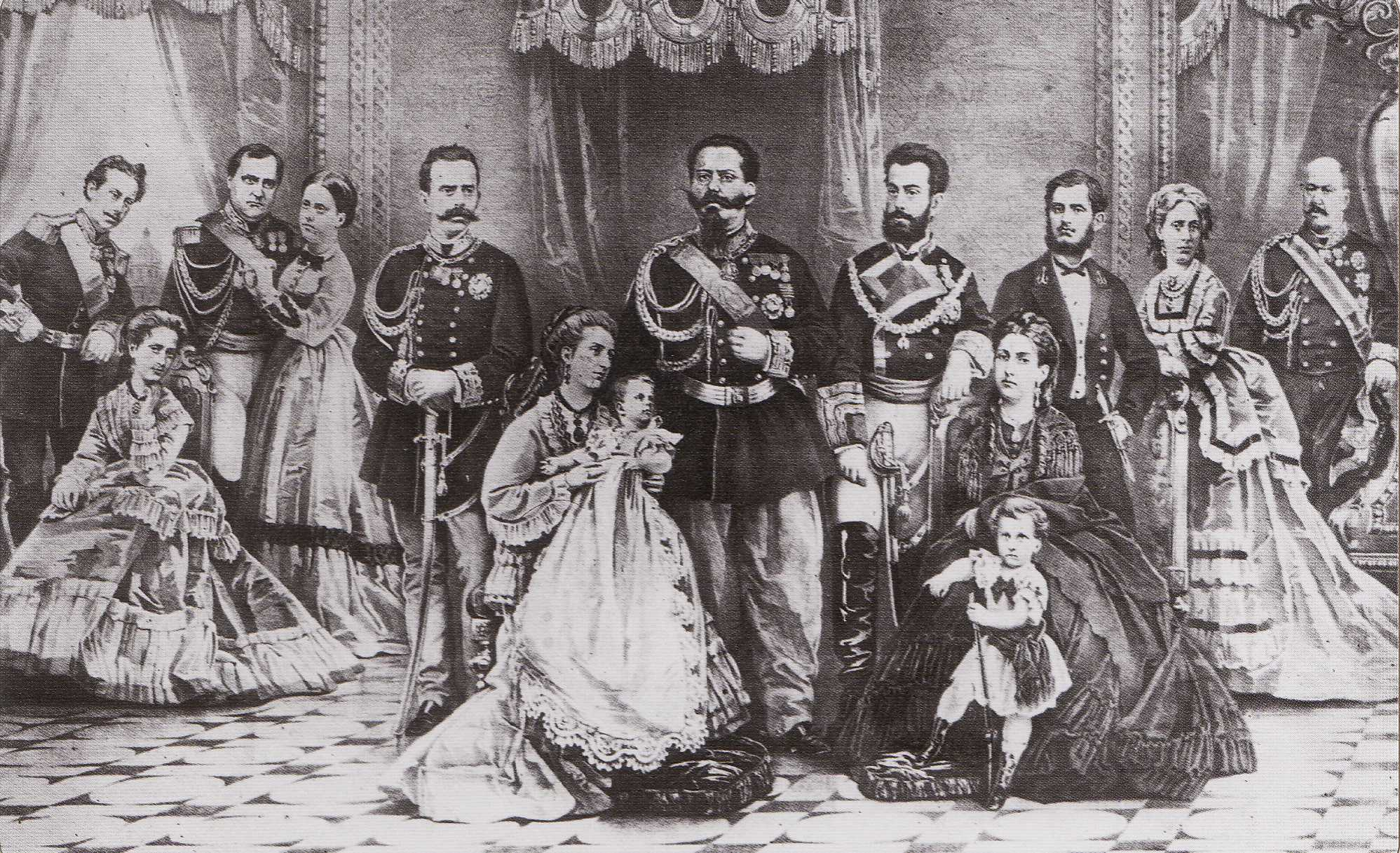 famiglia Reale all'epoca di Vittorio Emanuele II.j